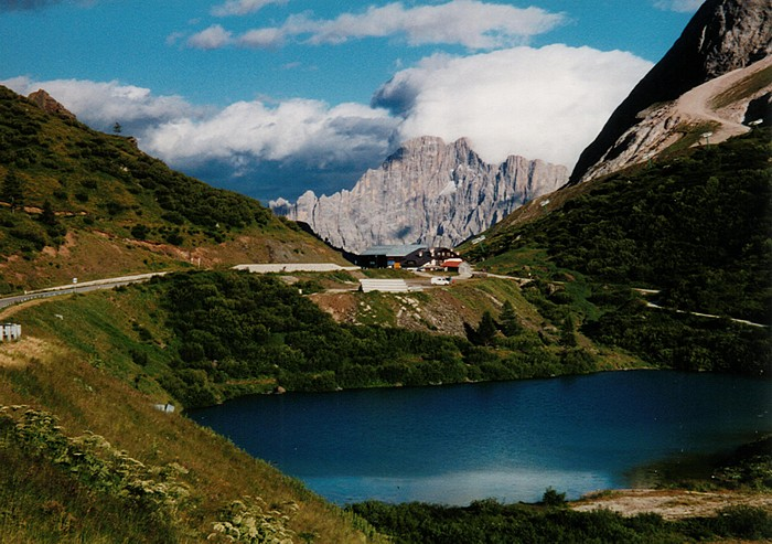 Passhöhe des Fedaiapasses mit der Civetta-Westwand im Hintergrund